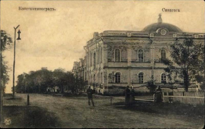 Синагога у Костянтинограді (Конграді; з 1922 — Красноград)